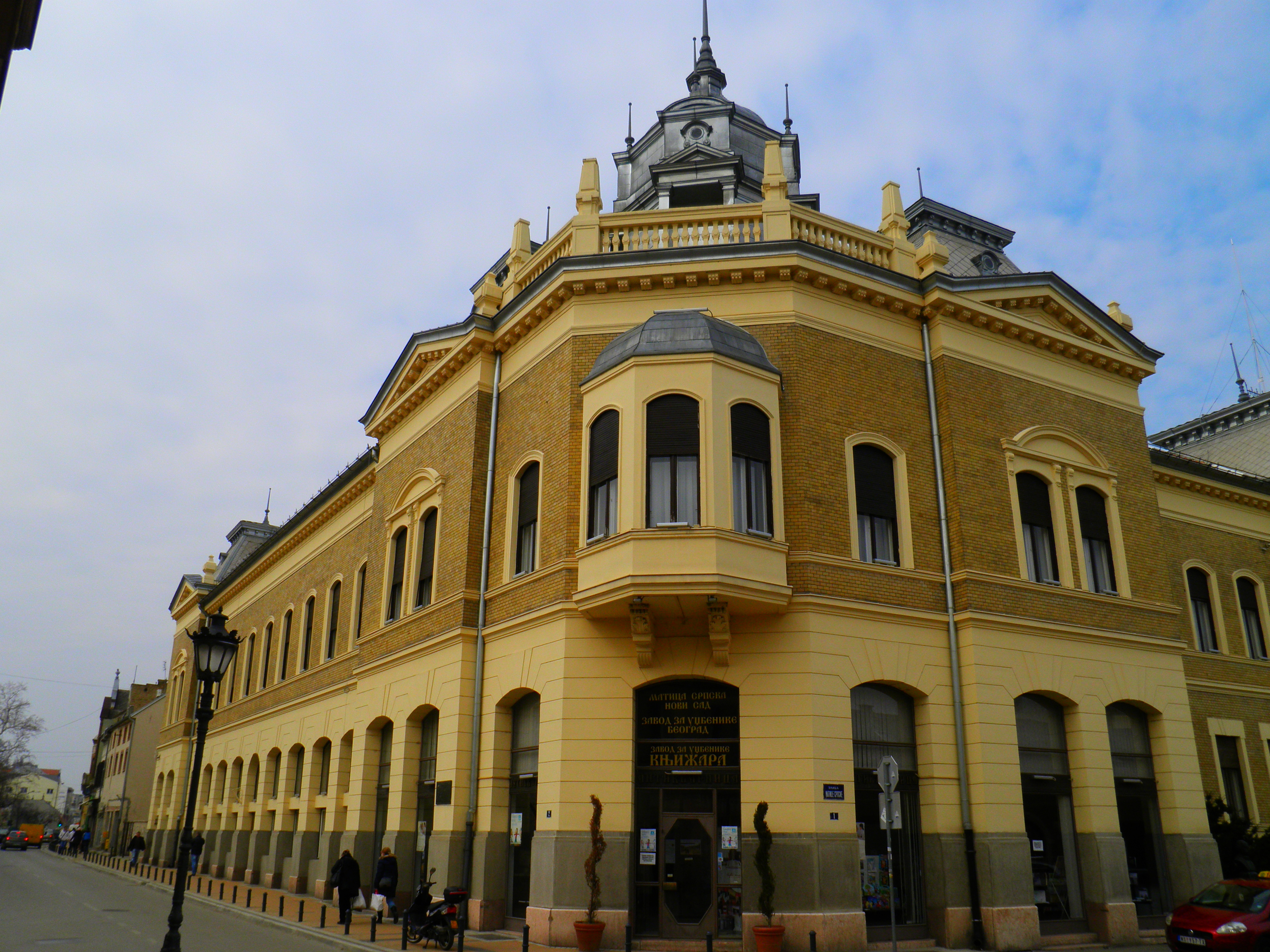 Matica Srpska